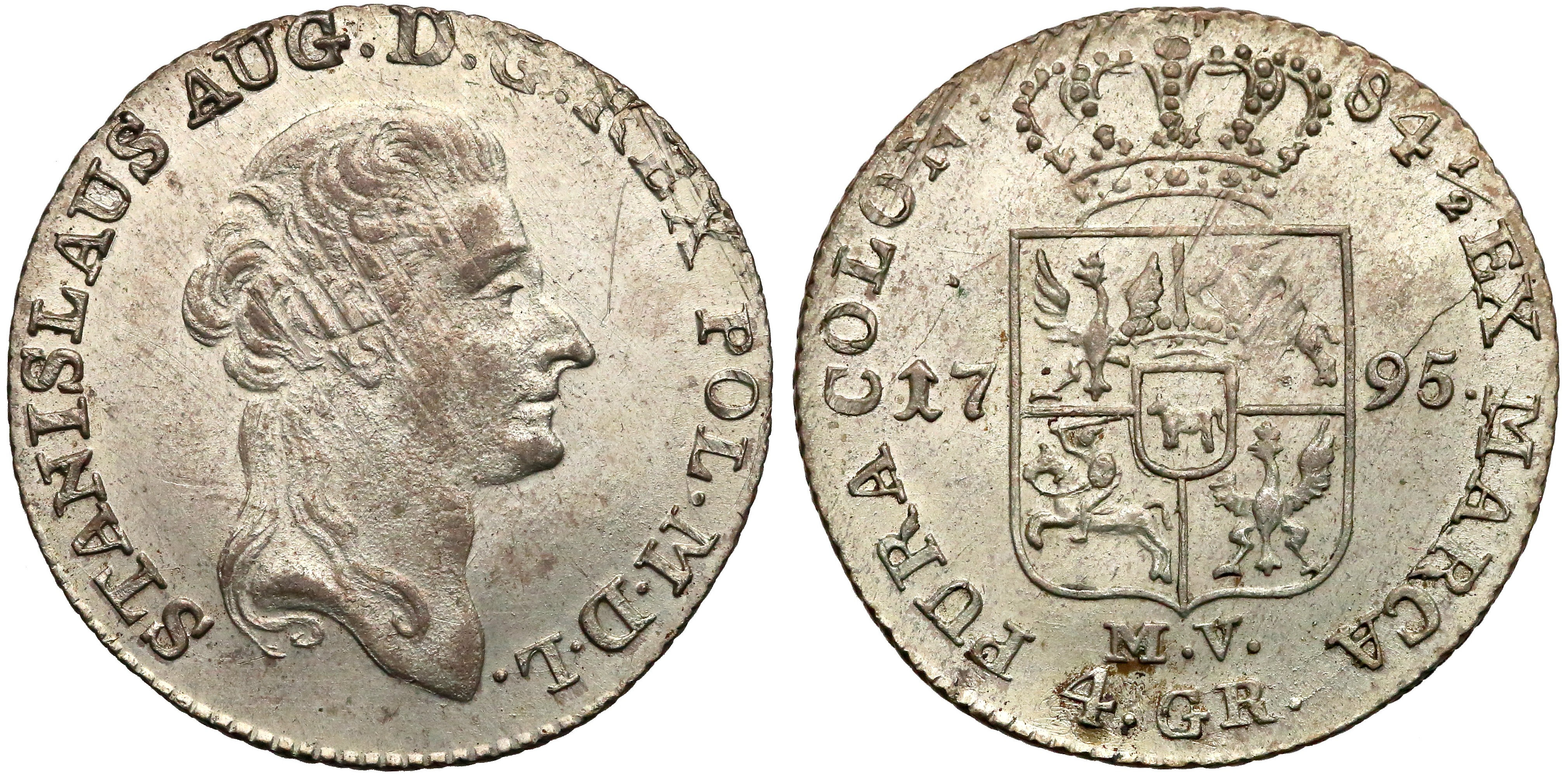 Złotówka koronna 1795